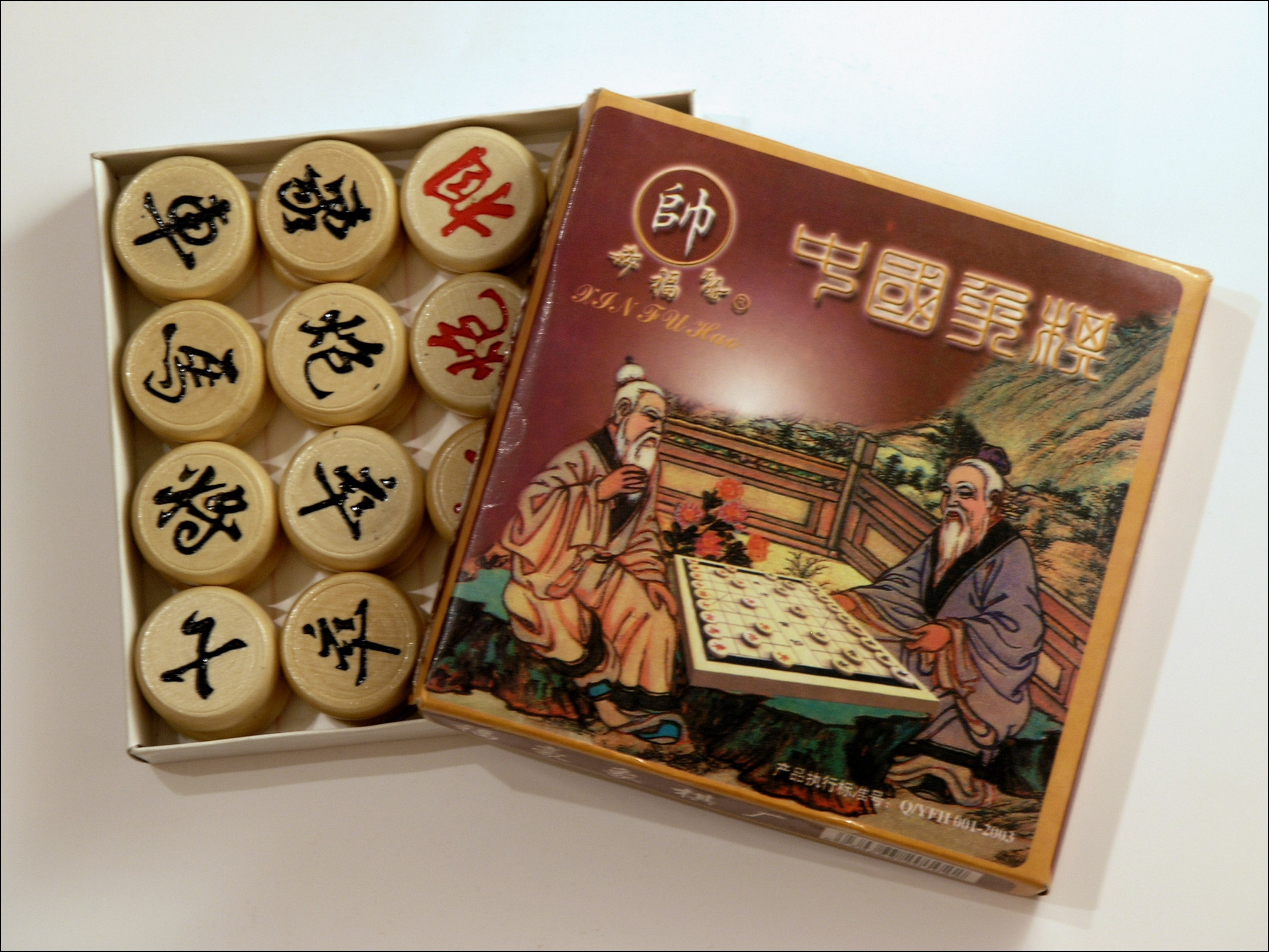 Xiangqi